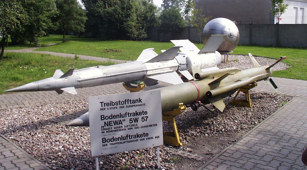 Flugabwehrraketen